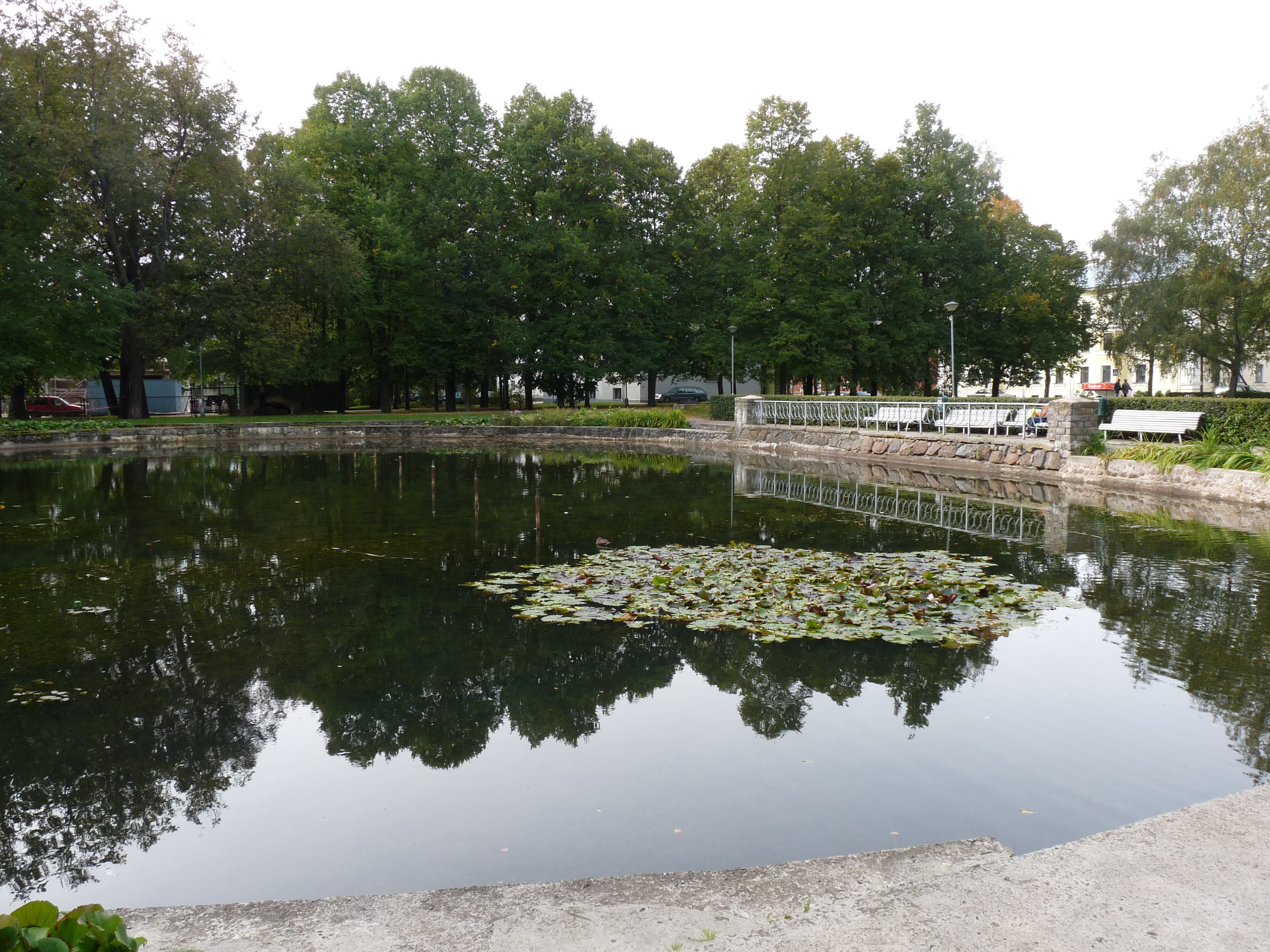 Vanemuise tiik, vaade Õpetaja tänava poolt, 22. september 2012